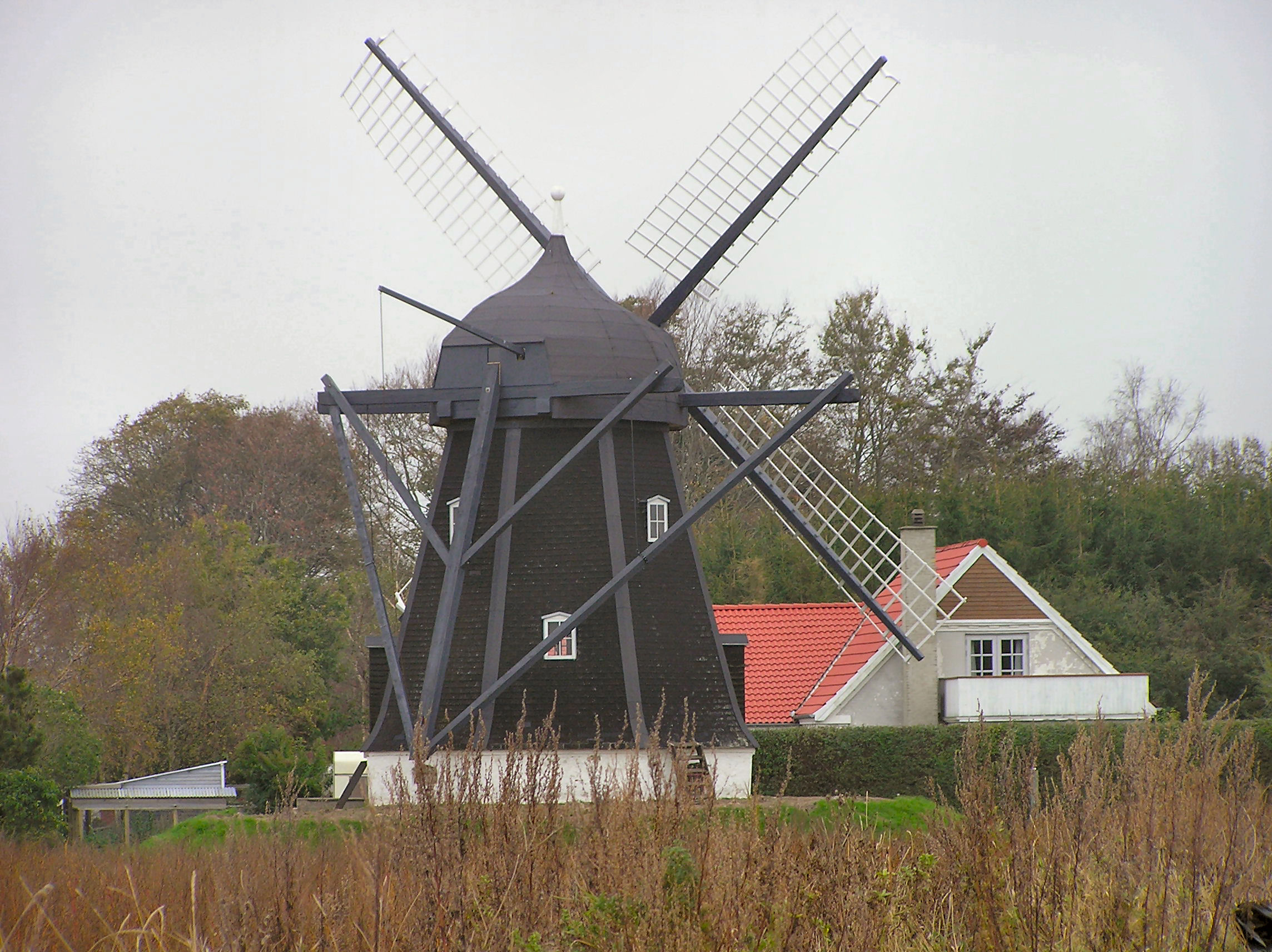 Ulsted Mølle/Windmill, Denmark